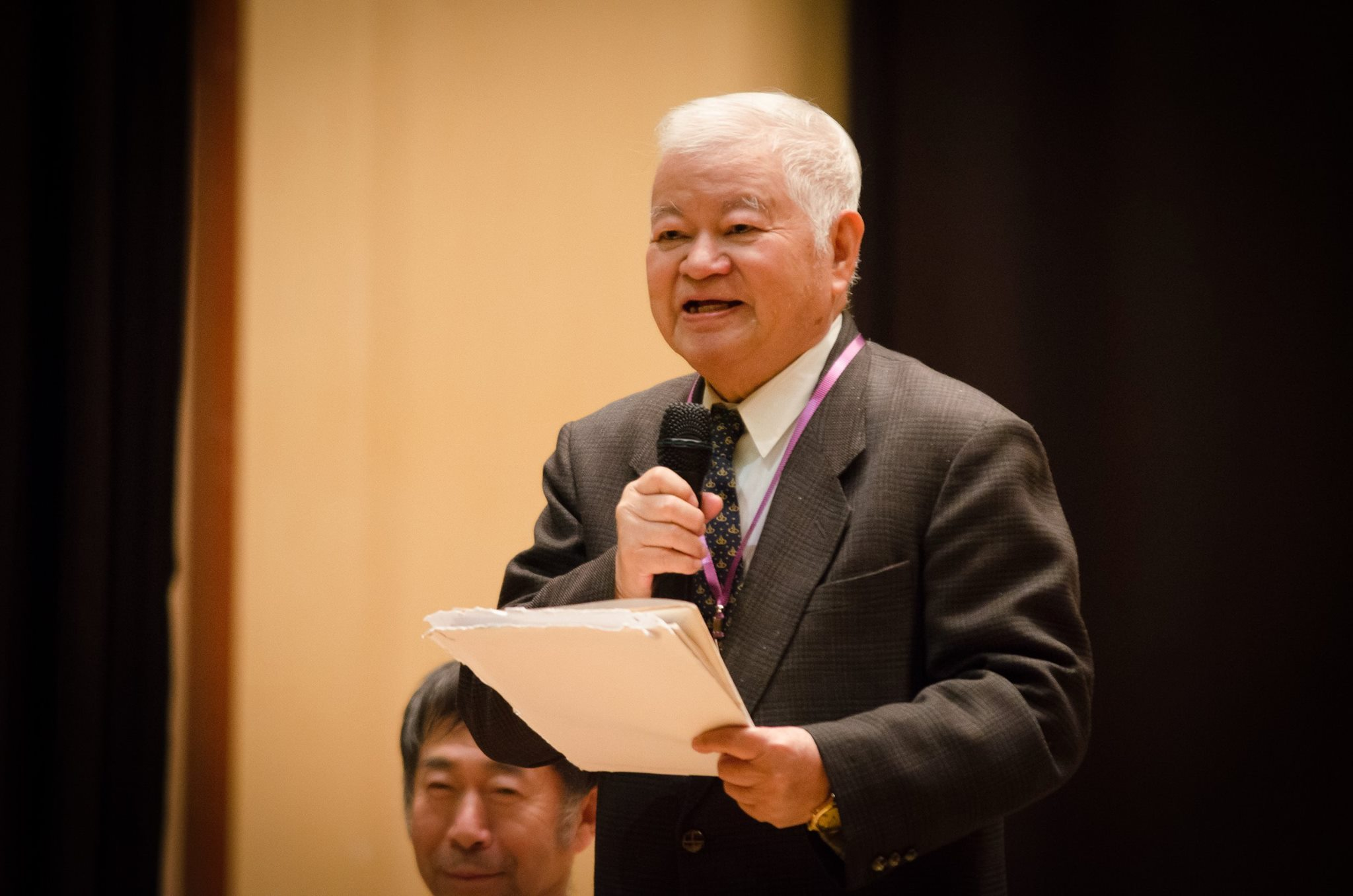 中華民國環境教育之父楊冠政教授之照片